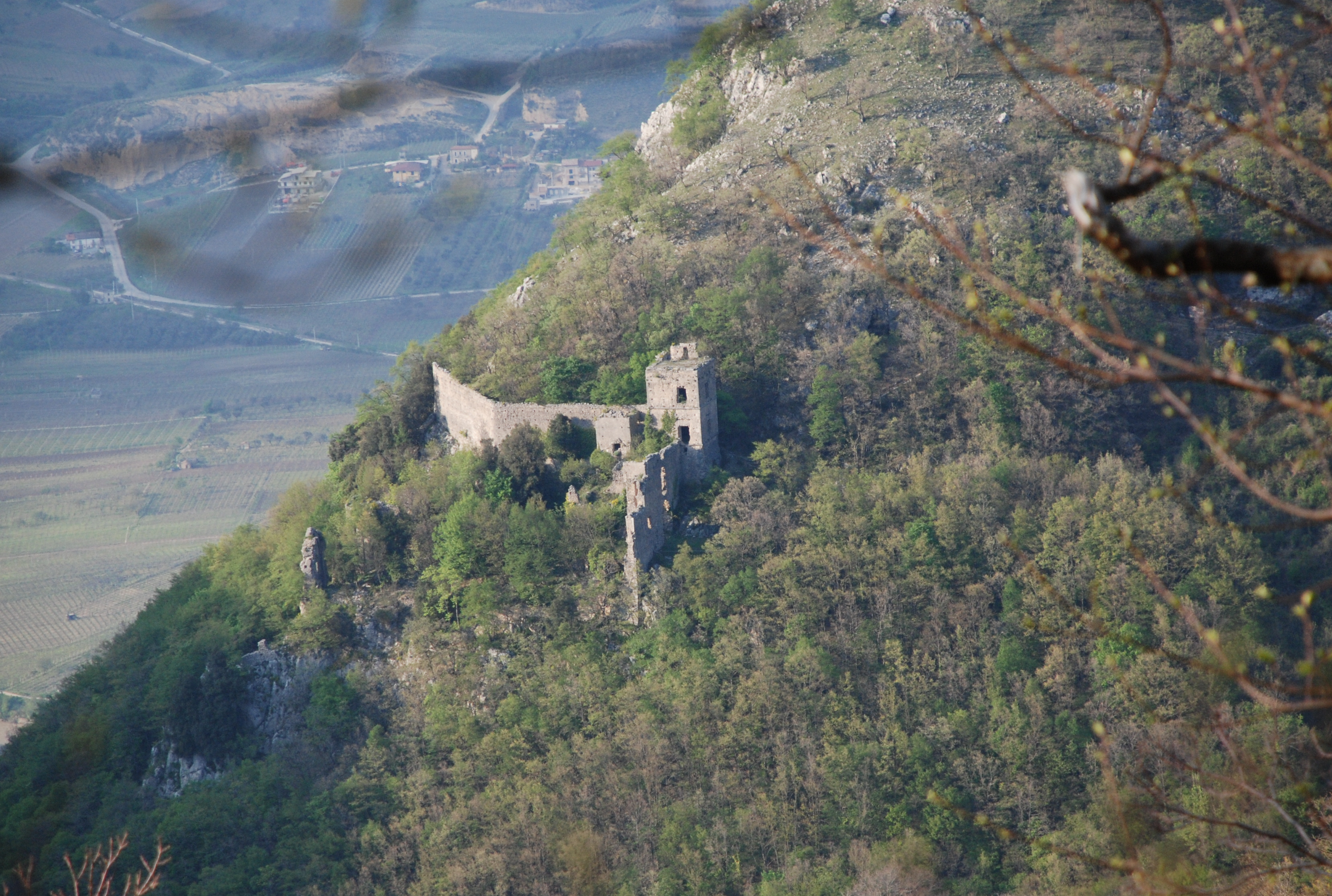 Vista del monastero abbandonato di S. Maria in Gruptis, Vitulano (BN)